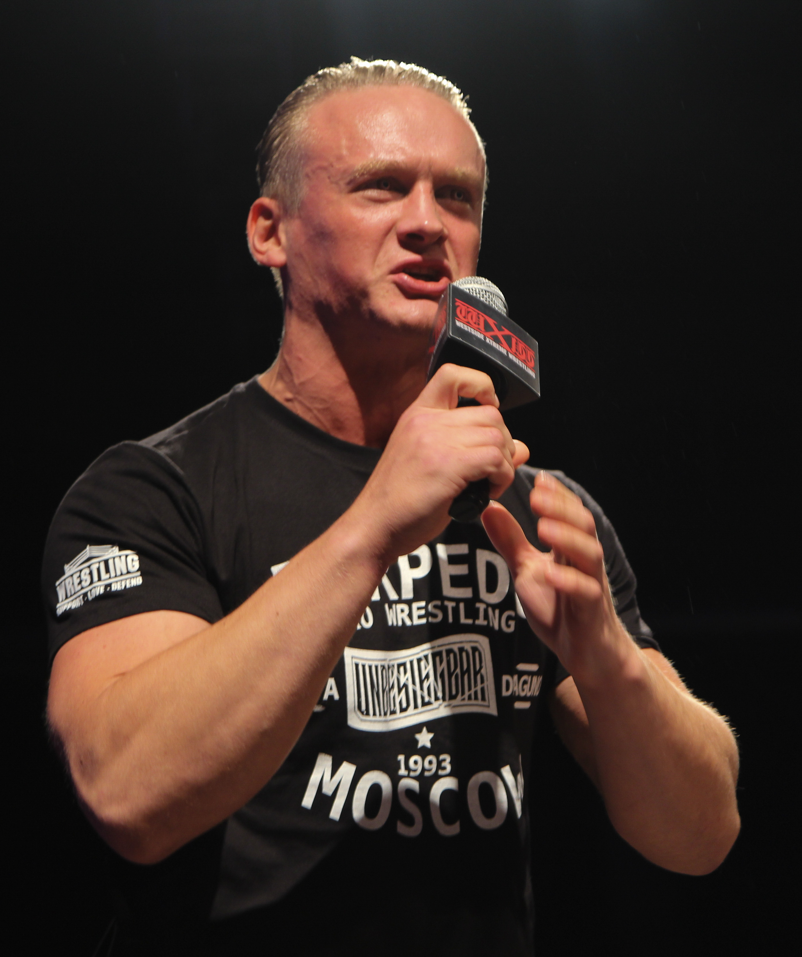 Ilja Dragunov s'adressant au public de la westside Xtreme wrestling en 2019